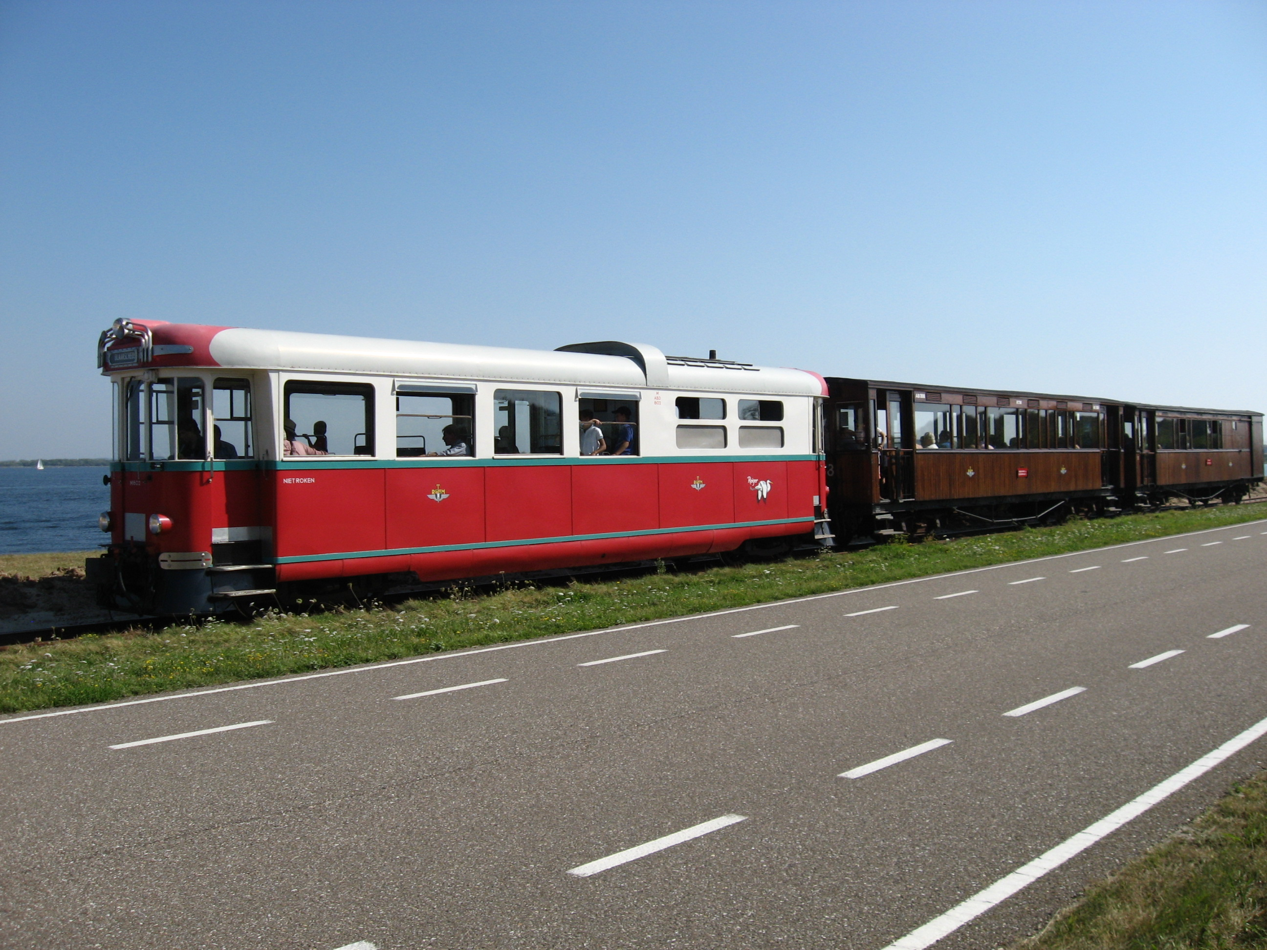 RTM tram langs de dijk in Zeeland met Port Zelanda in de achtergrond